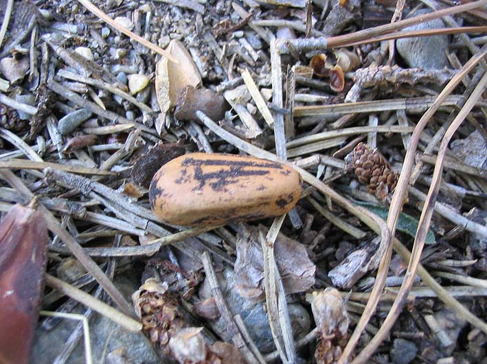 Pignon (fruit de Pinus pinea) Photo prise à Ille-sur-Têt 66 en octobre 2004, Jean Tosti 10/2004